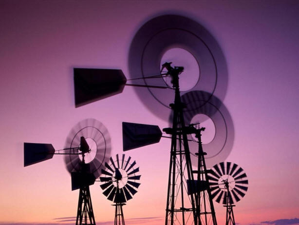 Molino de viento, Chile